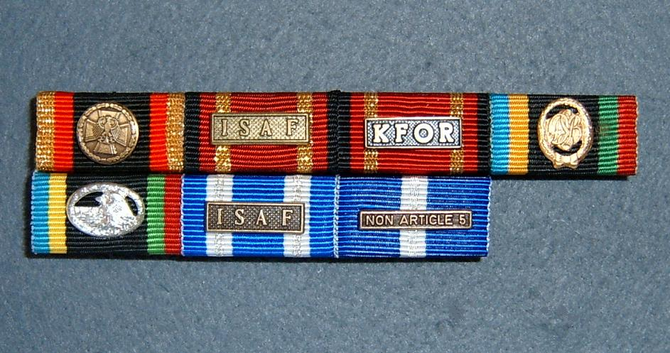 Bandschnalle 7 fach